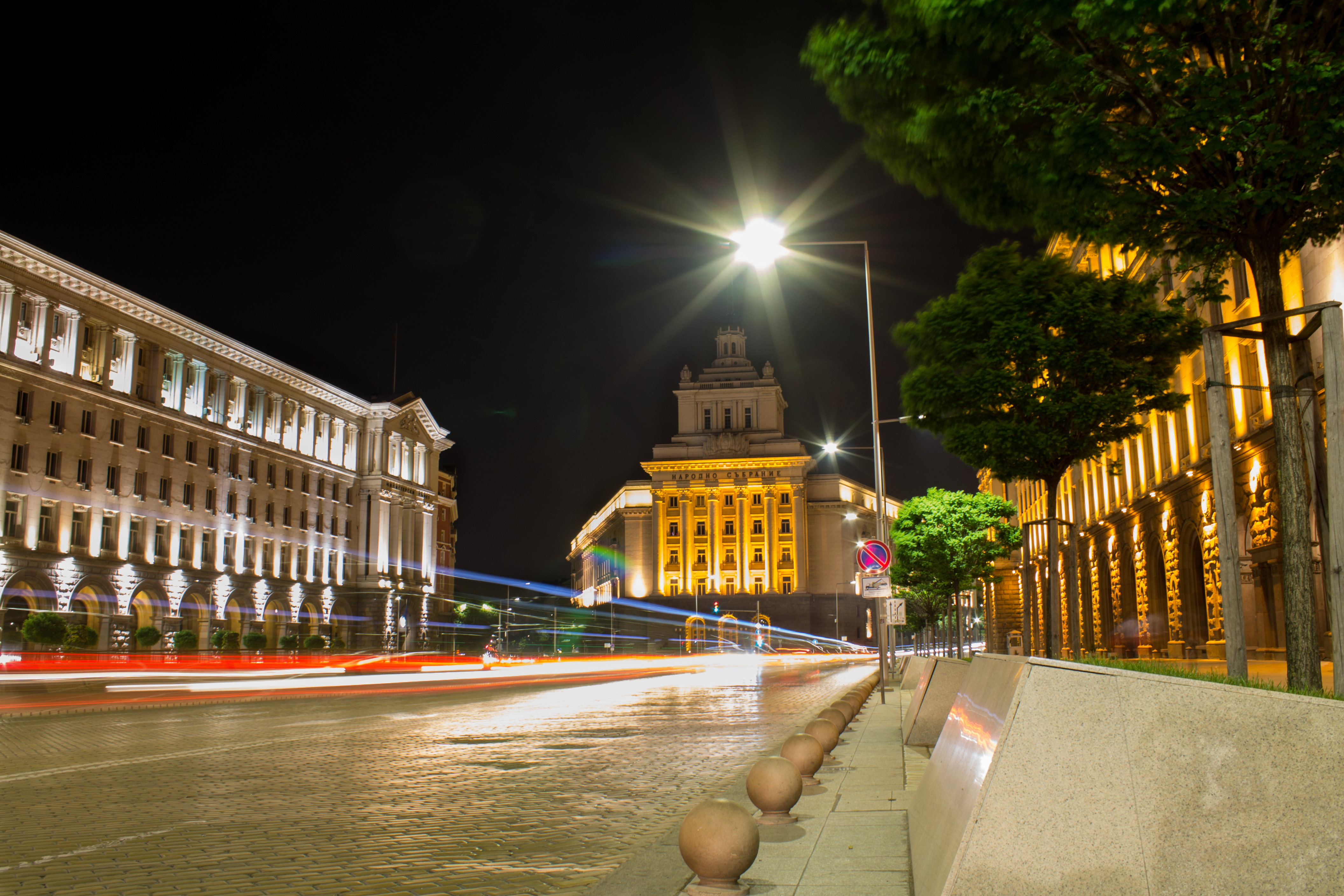 Централното историческо ядро на София